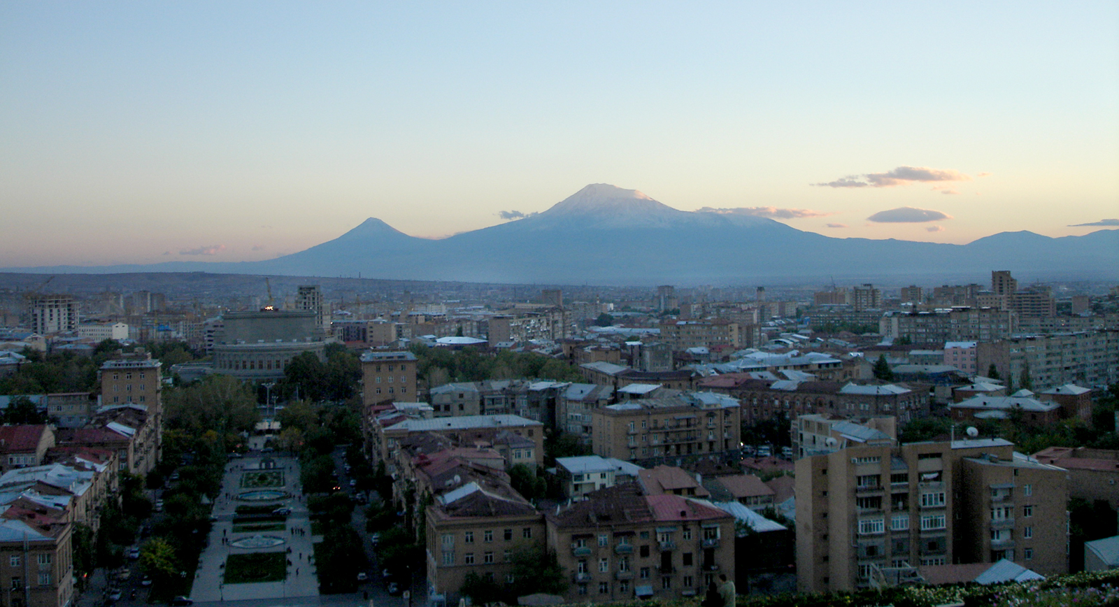 Erevan au coucher du soleil